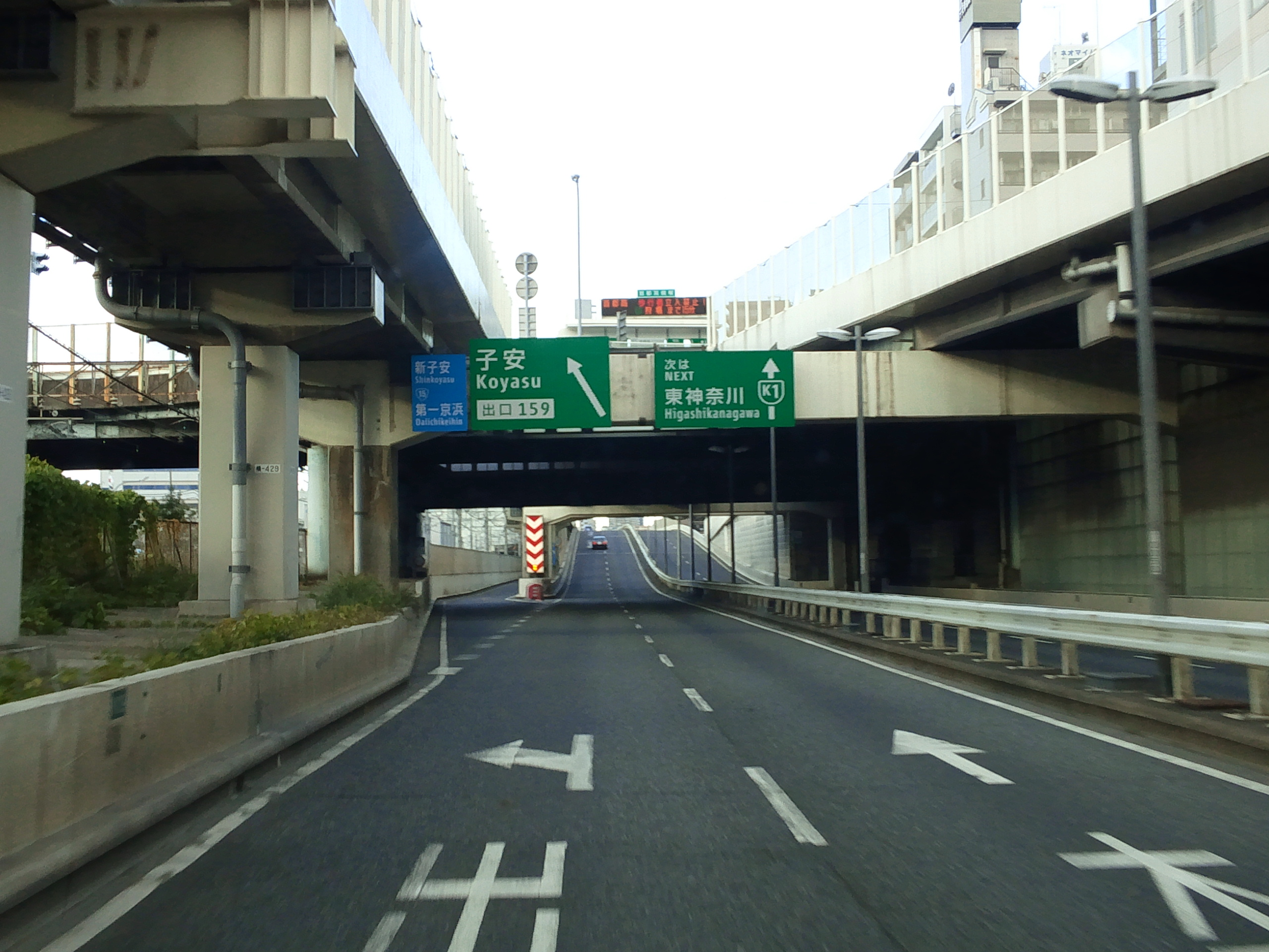 首都高速道路神奈川1号横羽線子安出口付近（金港JCT方面側出口）